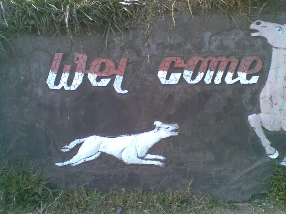 Kesalahan eja bahasa Inggris di salah satu fasilitas wisata di Probolinggo